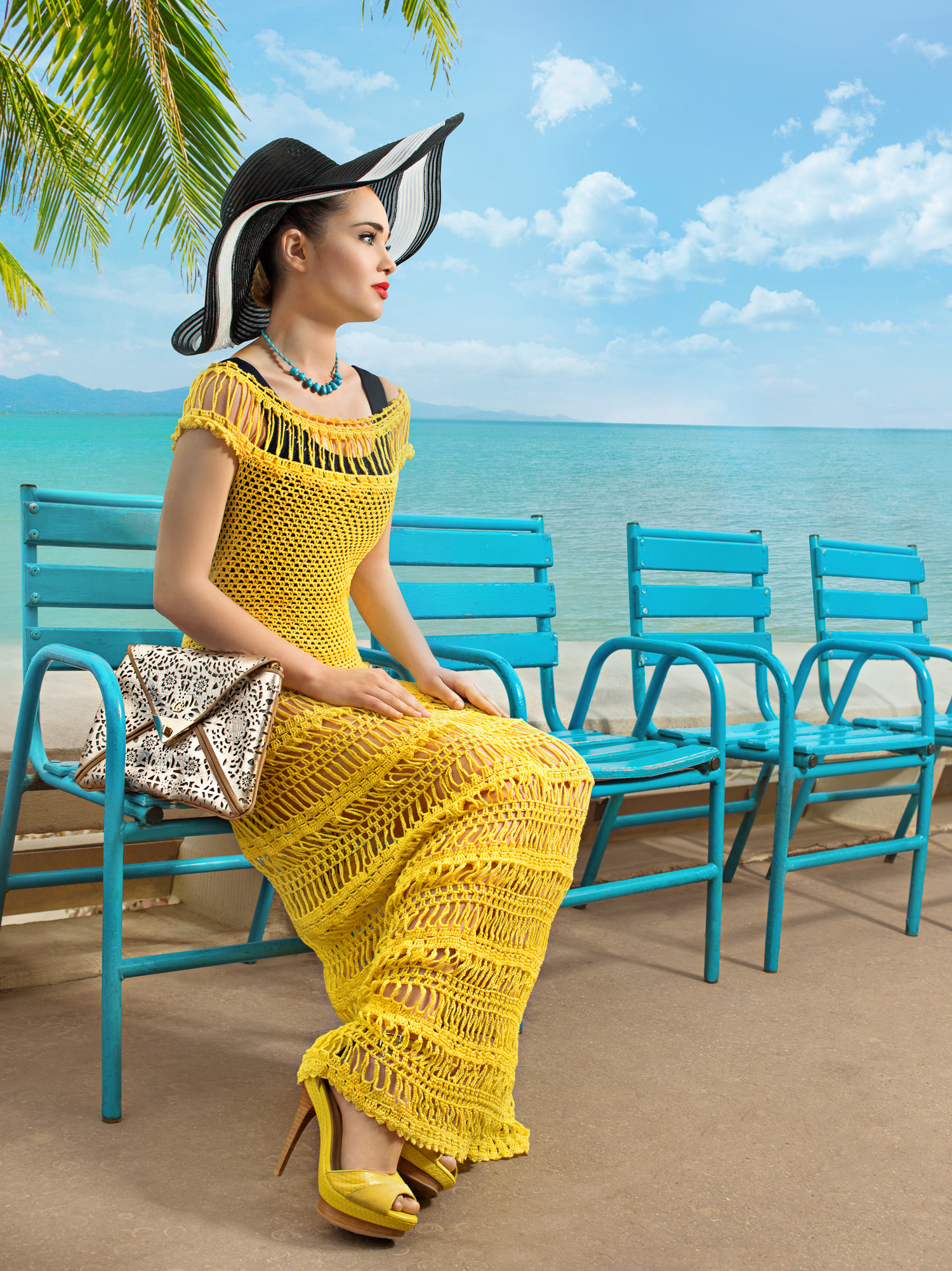 Photo commandée par le Palais des Festivals de Cannes au photographe Gil Zetbase